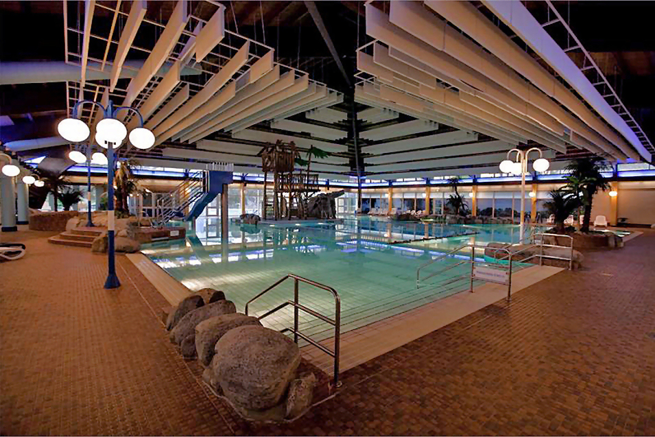 Innenansicht des ehemaligen Freizeitbades "Oase" in Essen-Frohnhausen